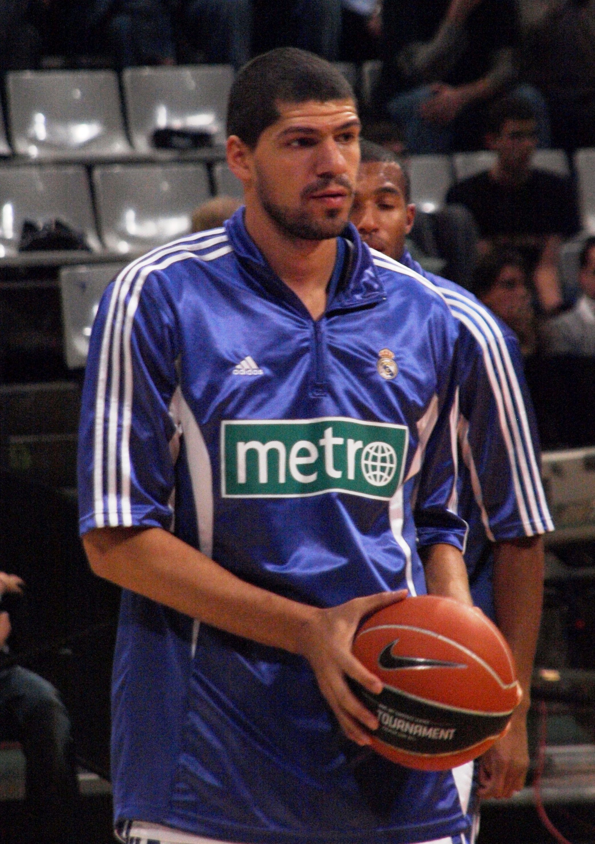 Lazaros Papadopoulos en el Olímpico de Badalona en noviembre de 2008